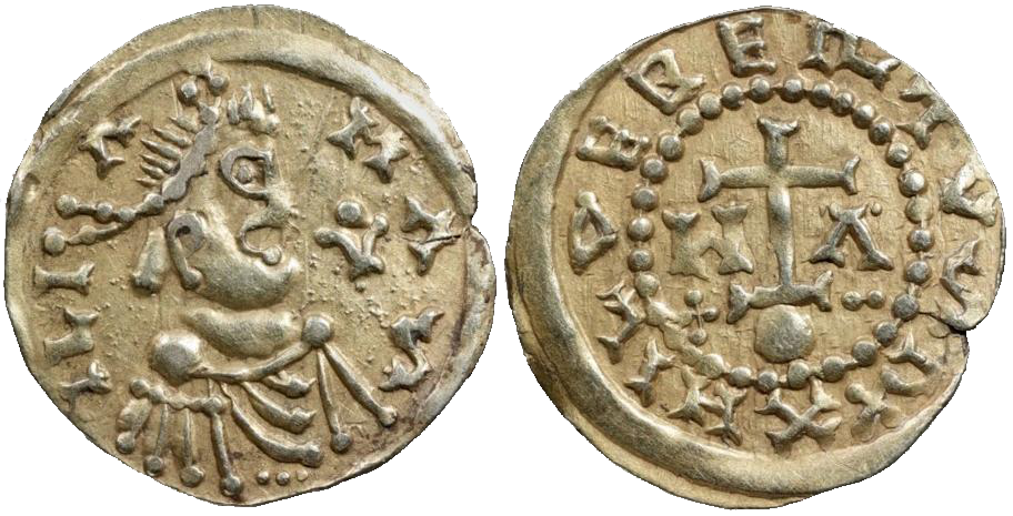 Solidus d'or de Childebert III frappé à Marseille (656-657). BNF, monnaies, médailles et antiques. Avers : Buste drapé et diadémé à droite. Revers : Croix sur un degré au-dessus d'un globe, accostée de M-A, une croisette et deux globules.